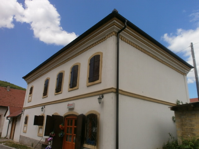 Кућа Милана Хаџивуковића Сликава е подигната во рамките на проектот „По трагата на душата 2015“.